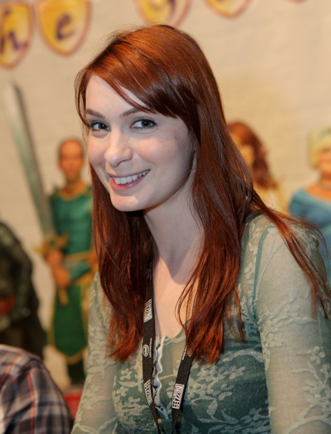 Felicia Day - BlizzCon 2011